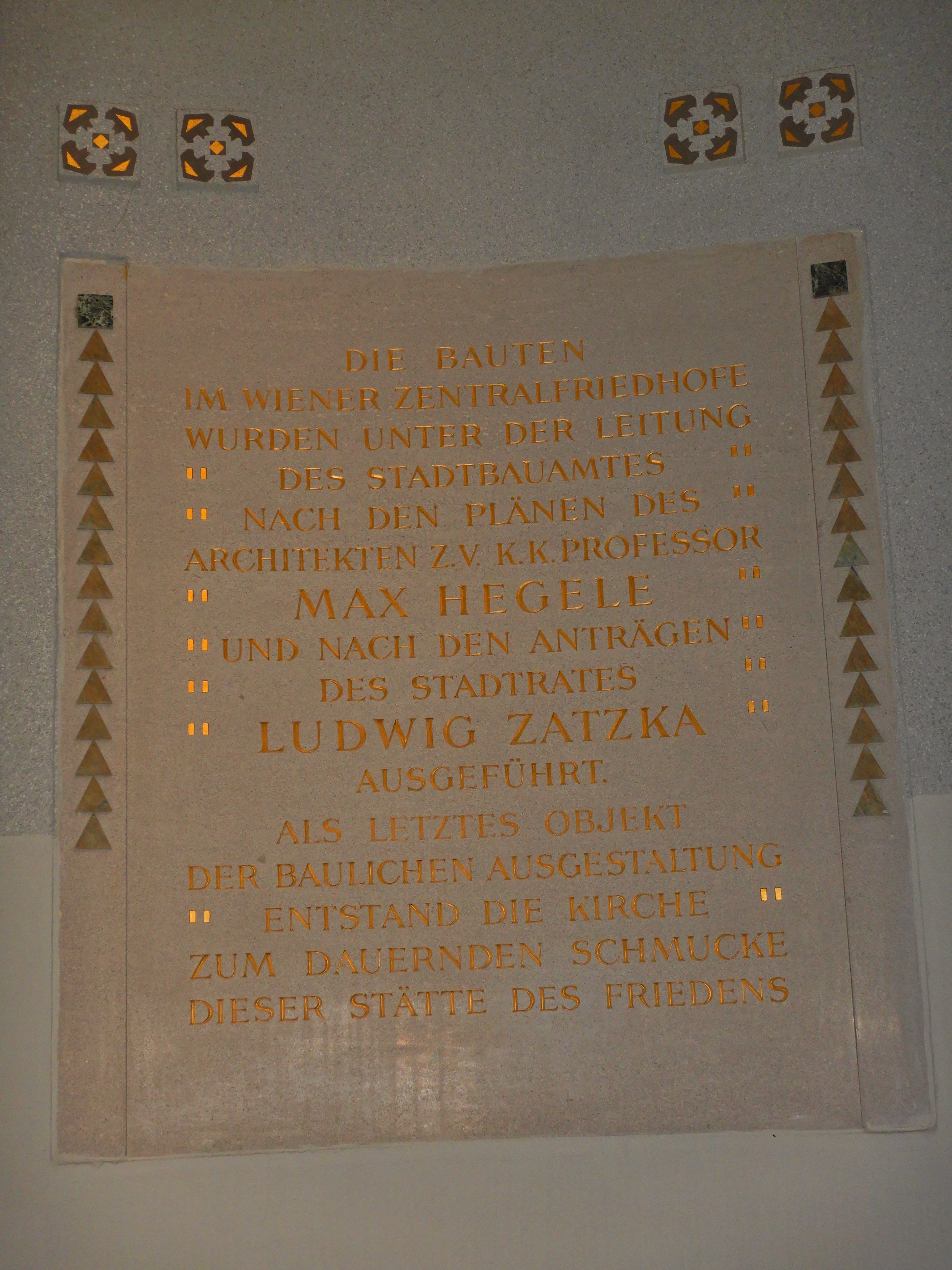 Gedenktafel für den Bau des Zentralfriedhofs in der Karl-Borromäus-Kirche (Wien, Simmeringer Hauptstraße 234)